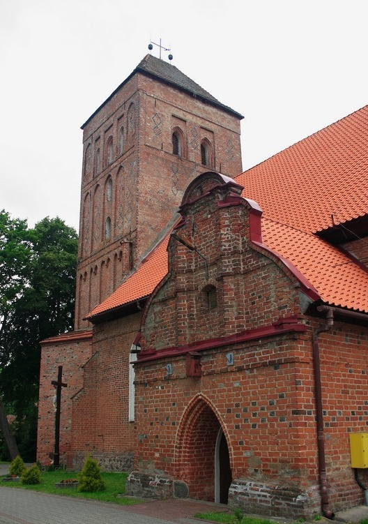 Srokowo – wieś w województwie warmińsko-mazurskim, w powiecie kętrzyńskim, w gminie Srokowo